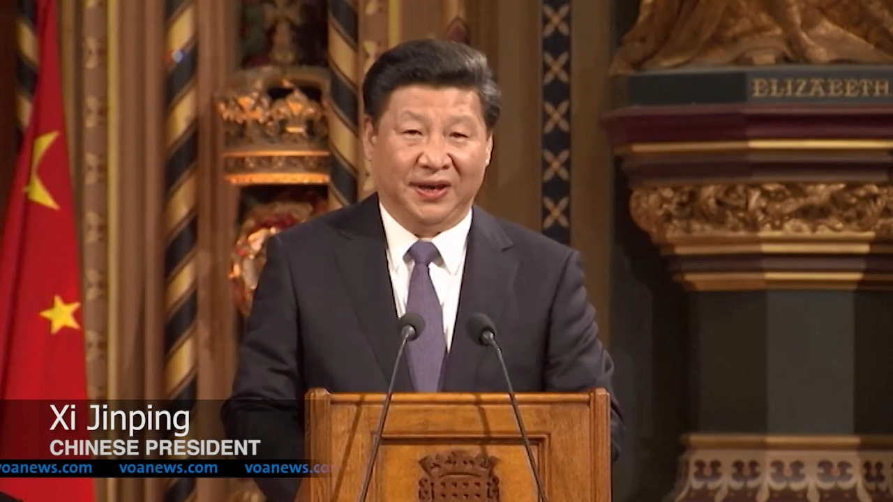 中文（中国大陆）: 习近平在英国国会演讲（VOA screenshot）